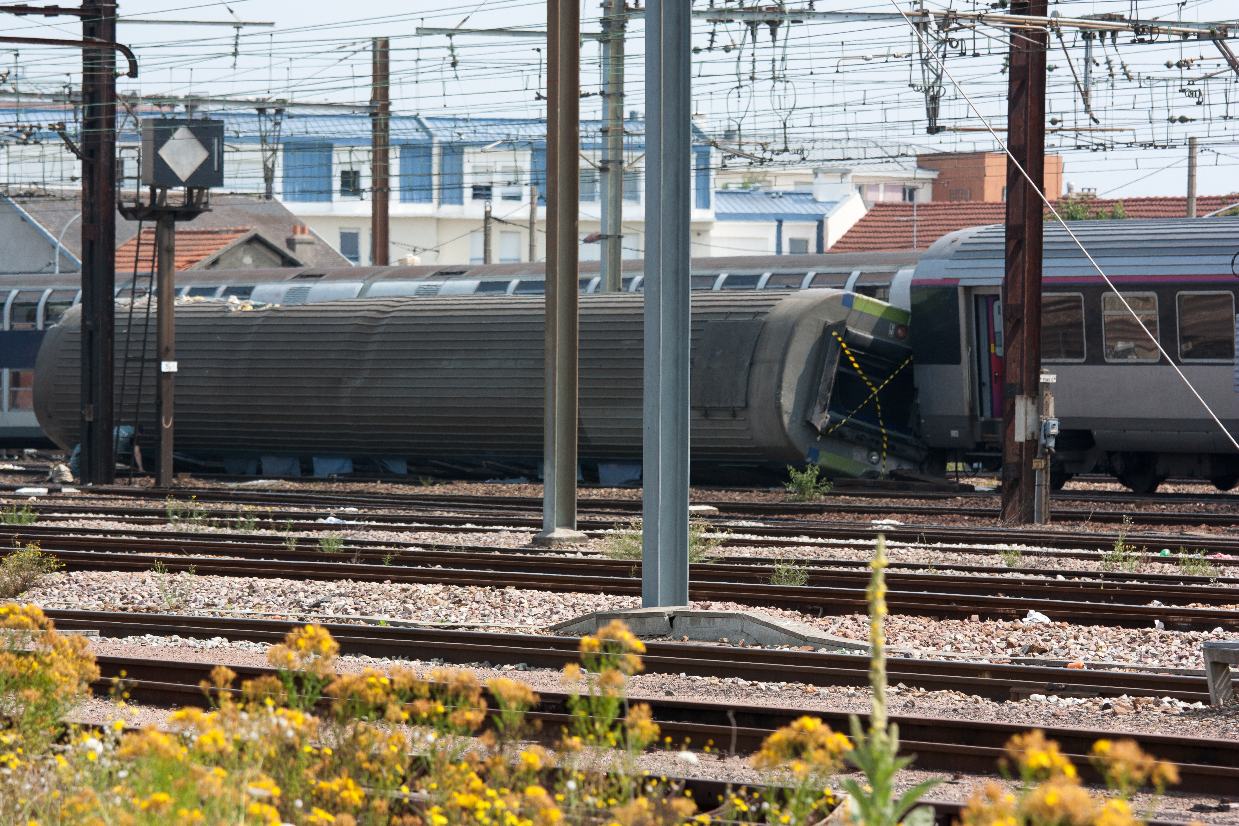 Accident ferroviaire de Brétigny-sur-Orge - Photos du train no 3657 (locomotive et voitures 1 à 4) en gare de Brétigny - Essonne - France